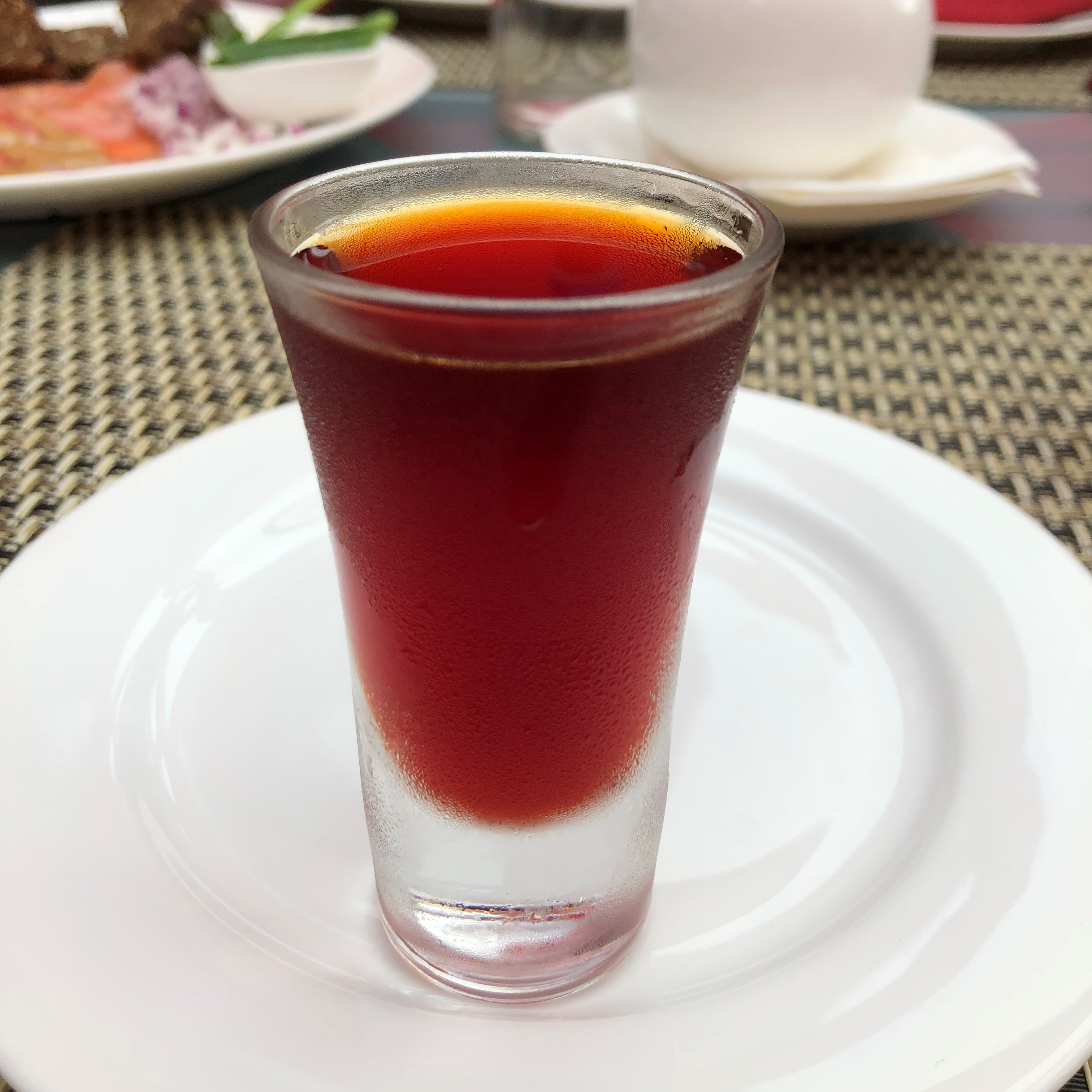 Калганная настойка. Россия